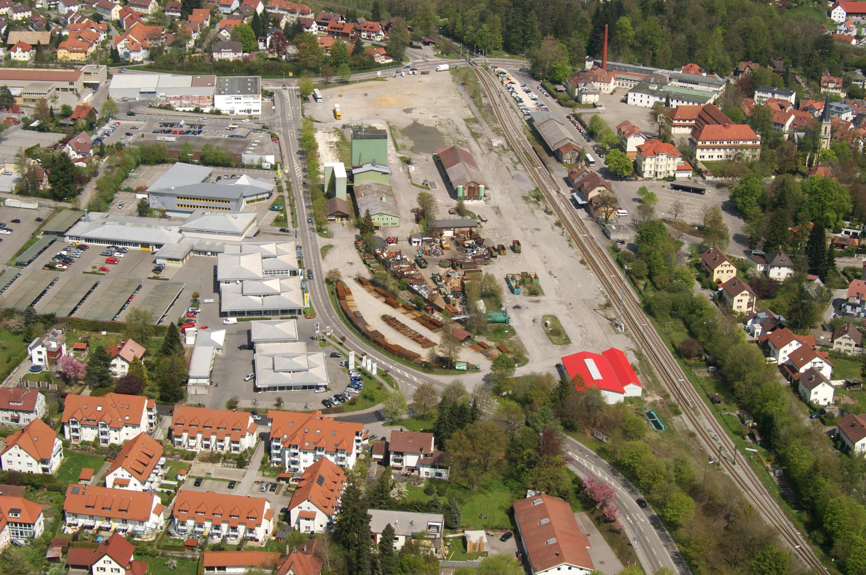 Luftaufnahme des Bahnhofsgeländes in Wangen im Allgäu